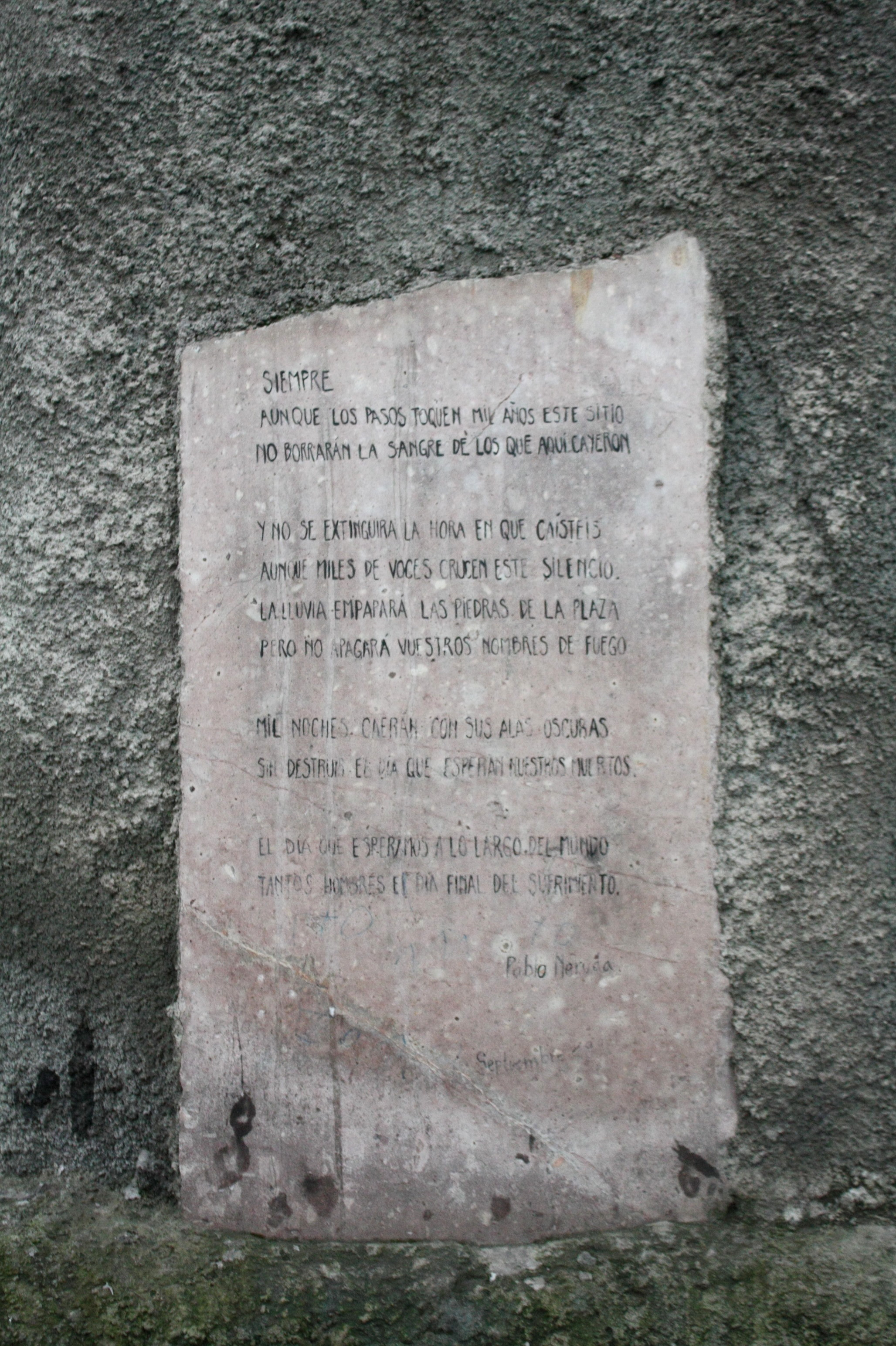 Piedra conmemorativa del año 1990. Tiene inscrito el poema Siempre, del Canto General, obra de Pablo Neruda.